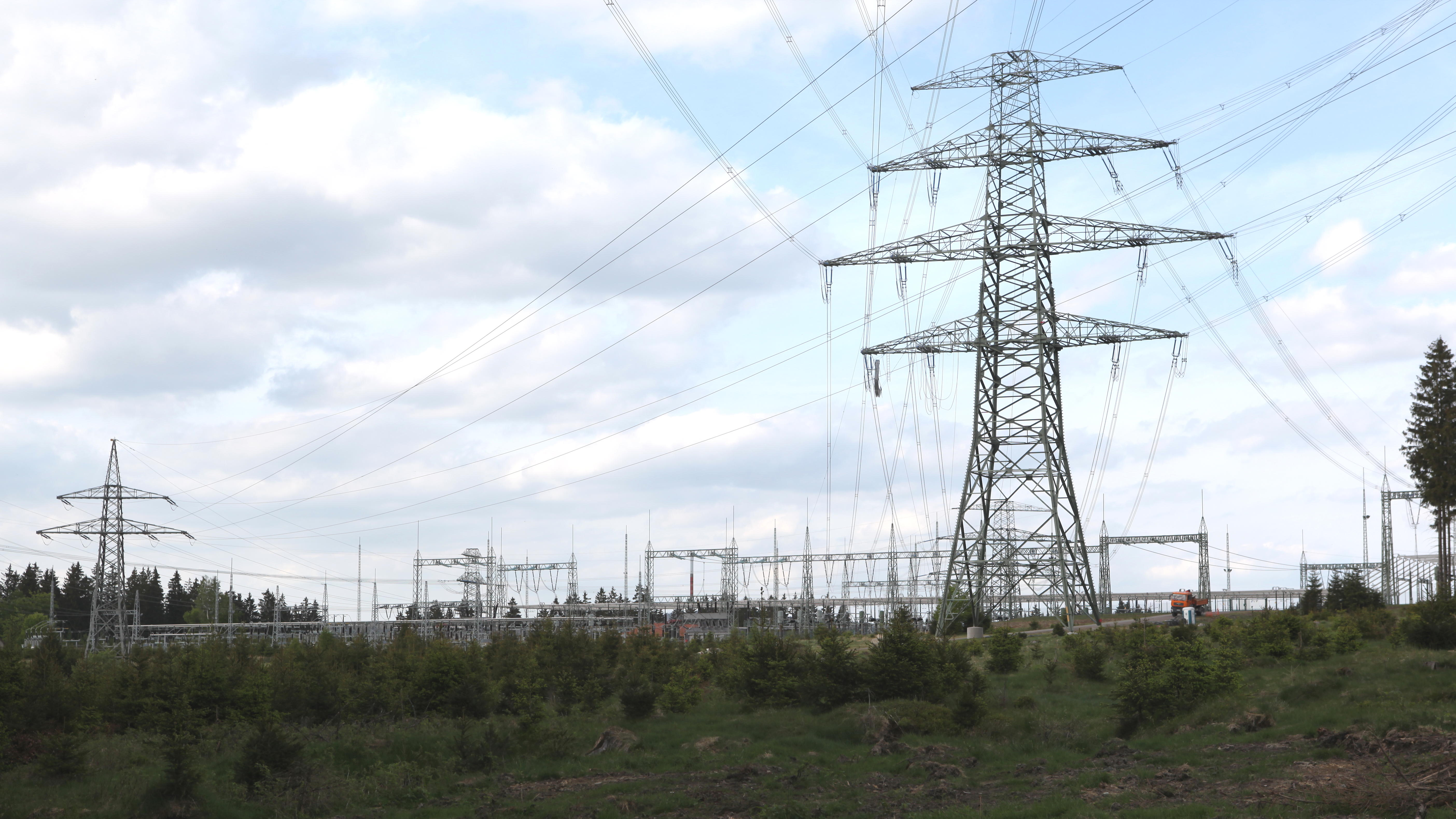 Umspannwerk Altenfeld mit Mast 1 der Thüringer Strombrücke, links die beiden Stromkreise der Thüringer Strombrücke, rechts die beiden Stromkreise vom Pumpspeicherwerk Goldisthal mit Übergang von Dreierbündel auf Viererbündel